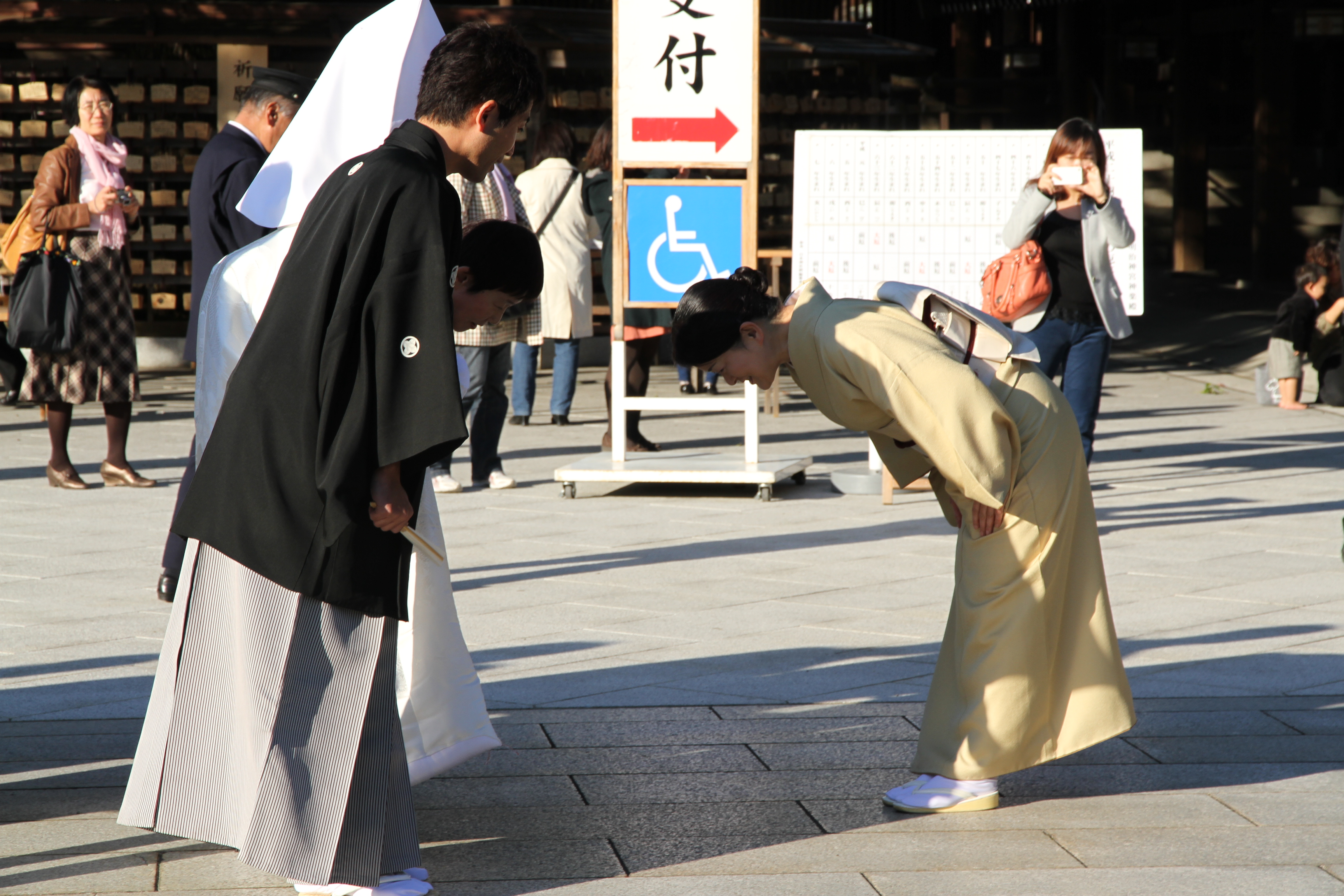 Japan - Tokyo